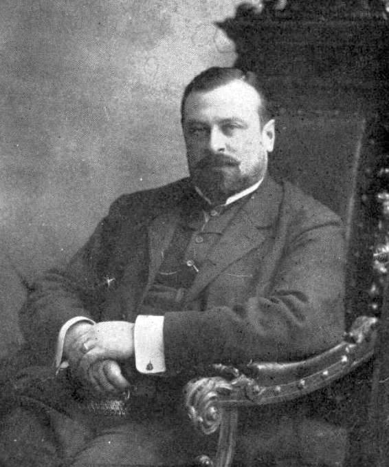 Александр Николаевич Наумов